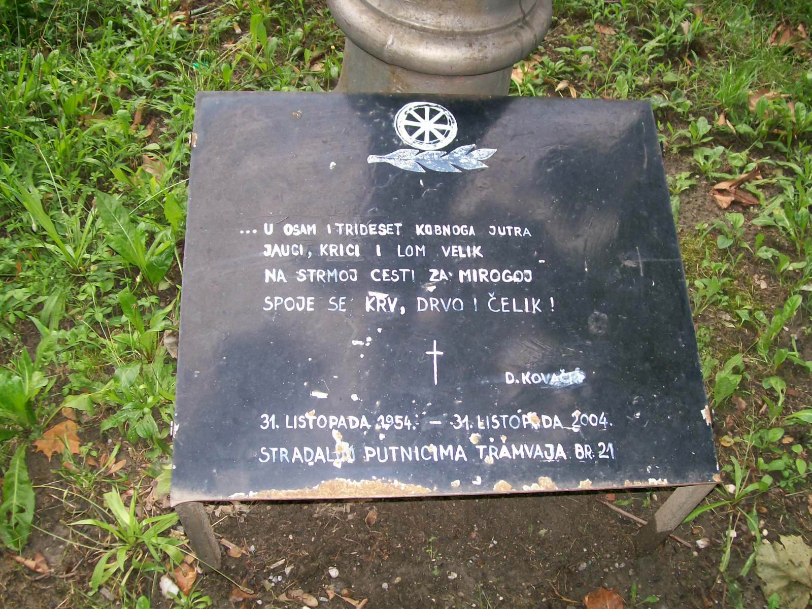 Spomen ploča na tramvajsku nesreću na Mirogojskoj cesti 31. listopada 1954.